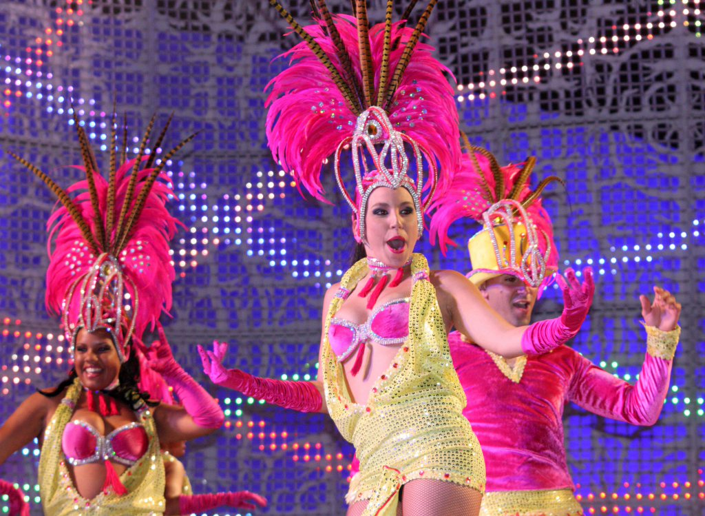 Comparsa Aragüimé, ganadora del Concurso de Comparsas de 2011 el Carnaval de Las Palmas de Gran Canaria, actuando en el Concurso de Maquillaje Corporal del mismo año.